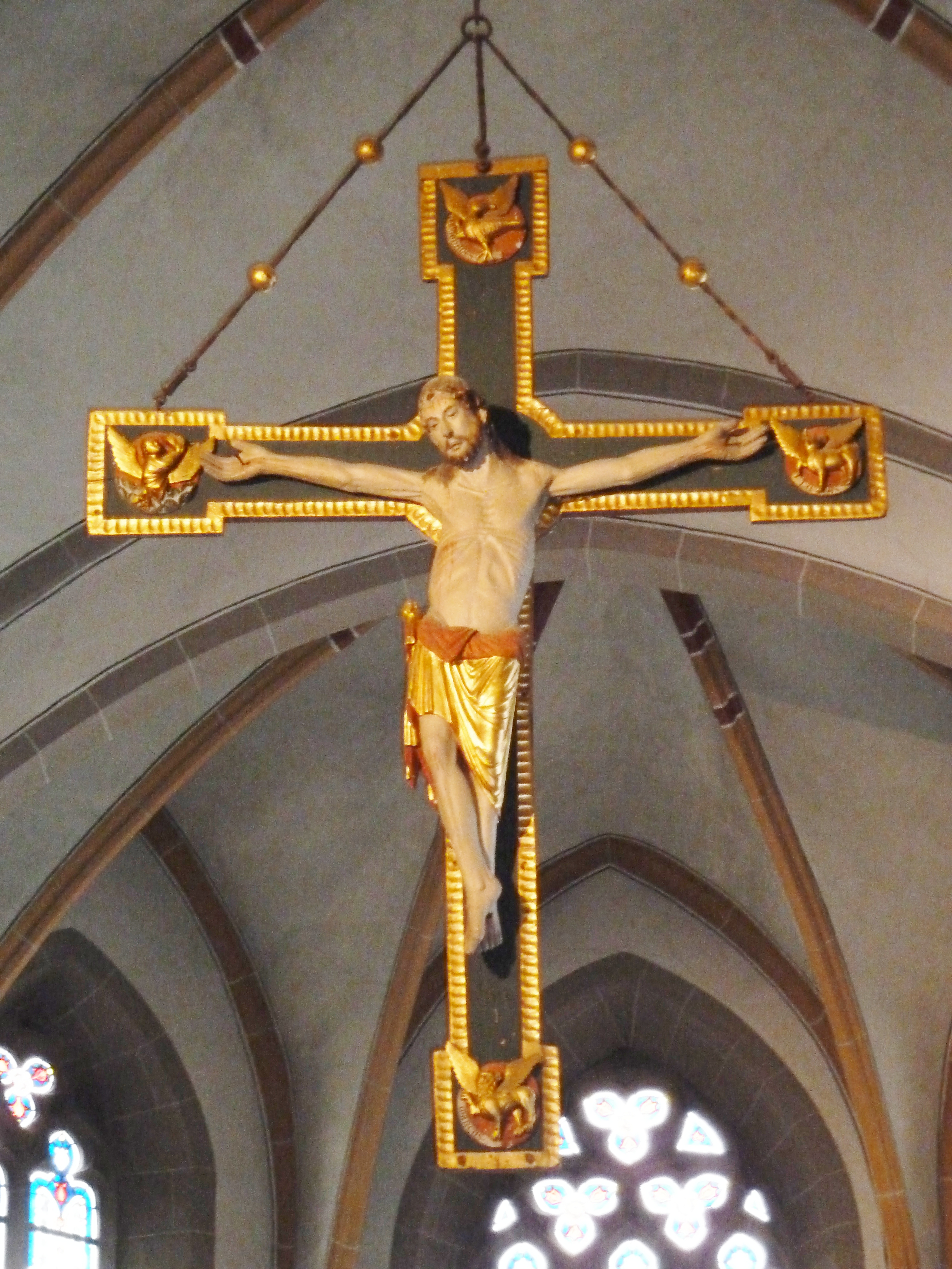 Triumphkreuz in der St. Matthäus Melle aus dem 13. Jahrhundert